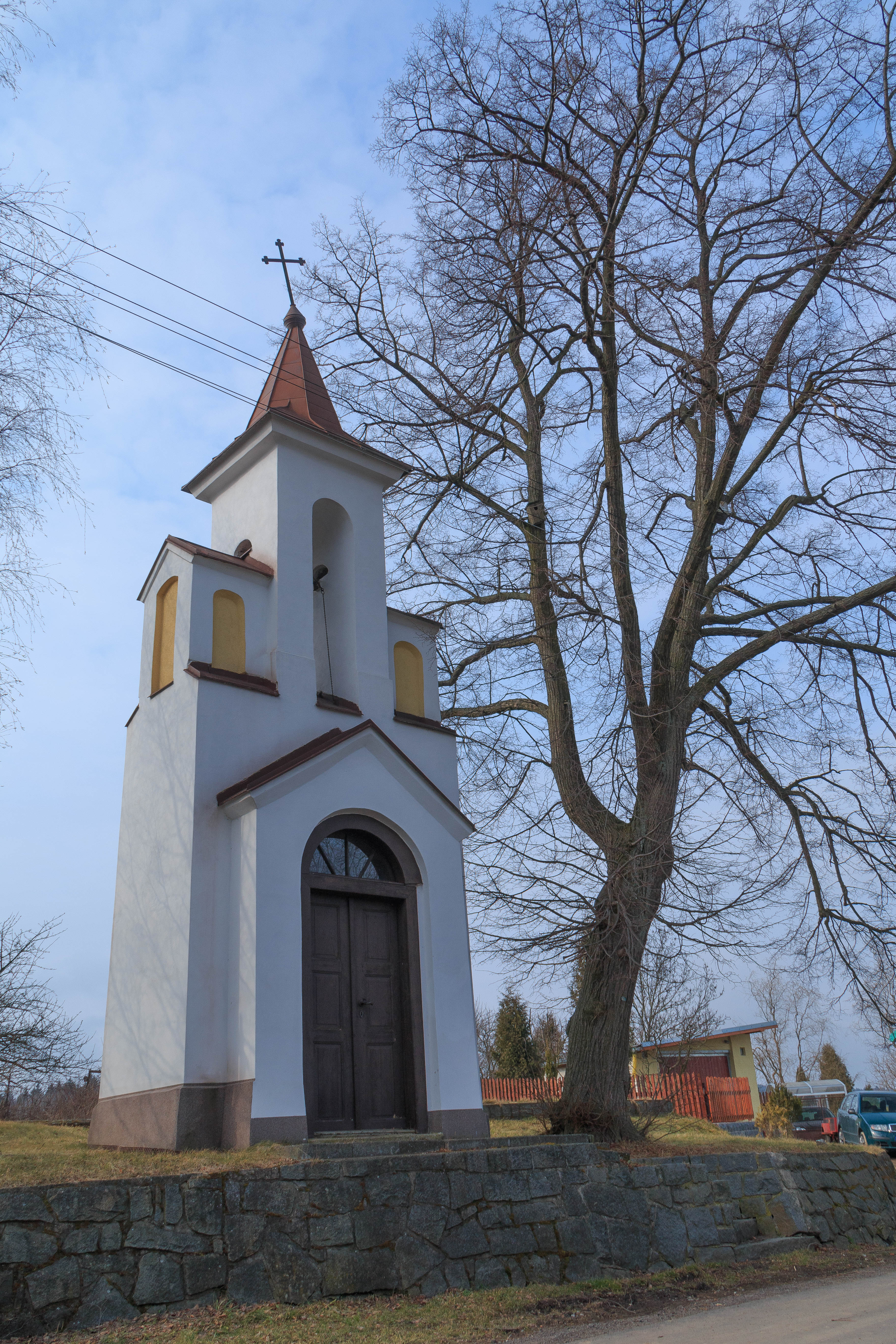 Ctětín kaple